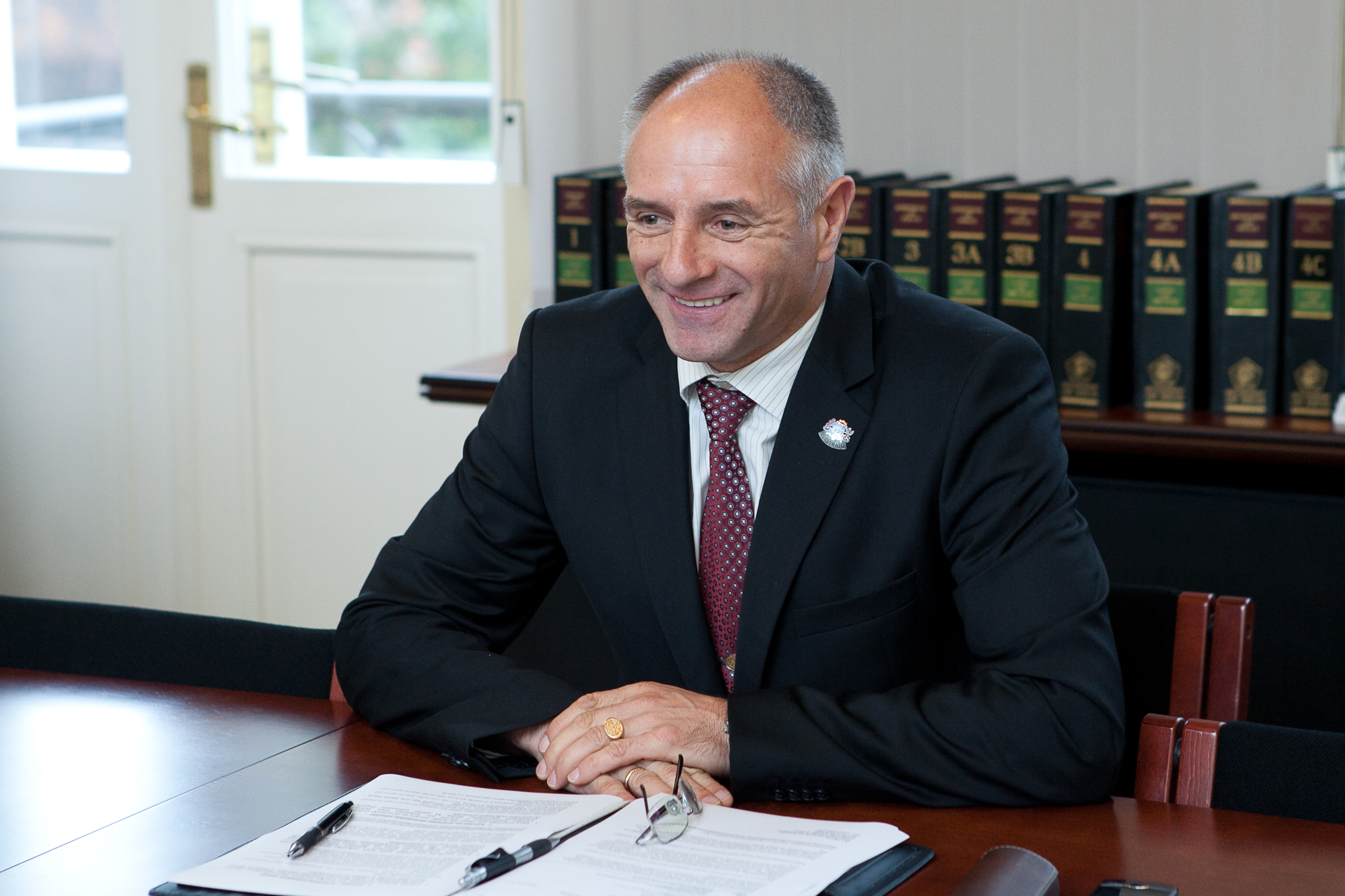 2012.gada 4.oktobris. Deputātu grupas sadarbībai ar Armēnijas parlamentu vadītājs Ivans Klementjevs tiekas ar Armēnijas Republikas ārkārtējo un pilnvaroto vēstnieku Latvijas Republikā Aru Aivazjanu (Ara Aivazian). Foto: Ernests Dinka, Saeimas Kanceleja